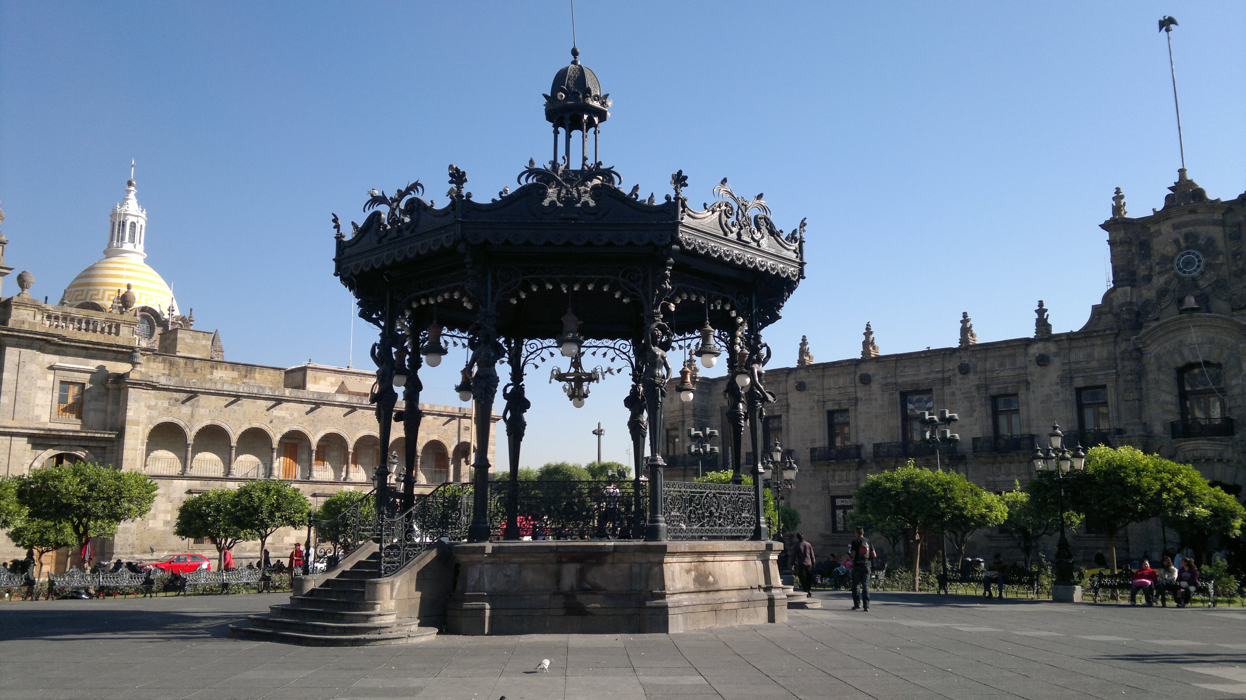 Quiosco de la Plaza de Armas de Guadalajara Jalisco, México